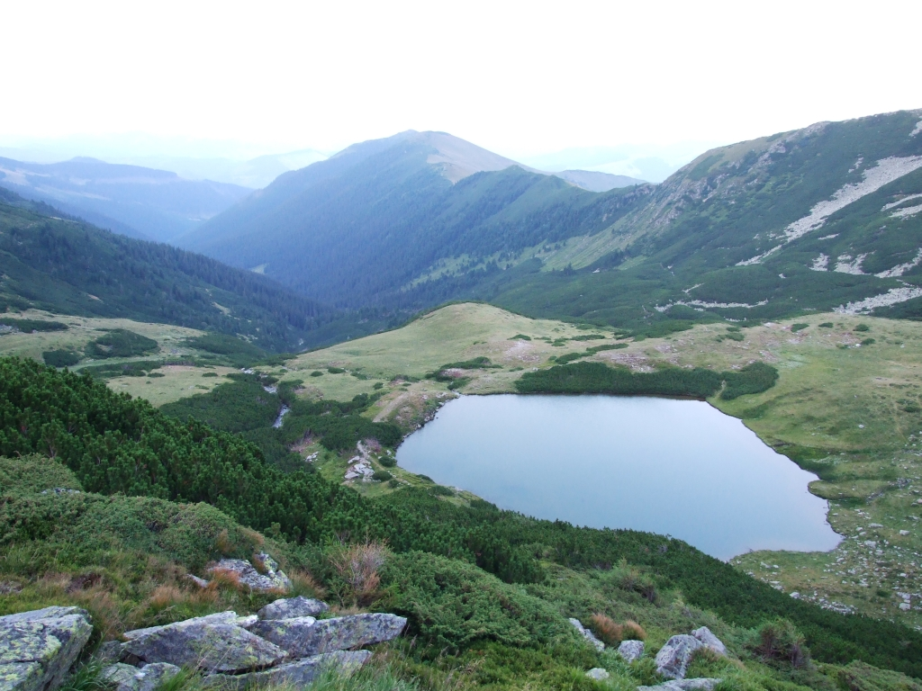 Lacul Lala Mare, Munţii Rodnei, România.